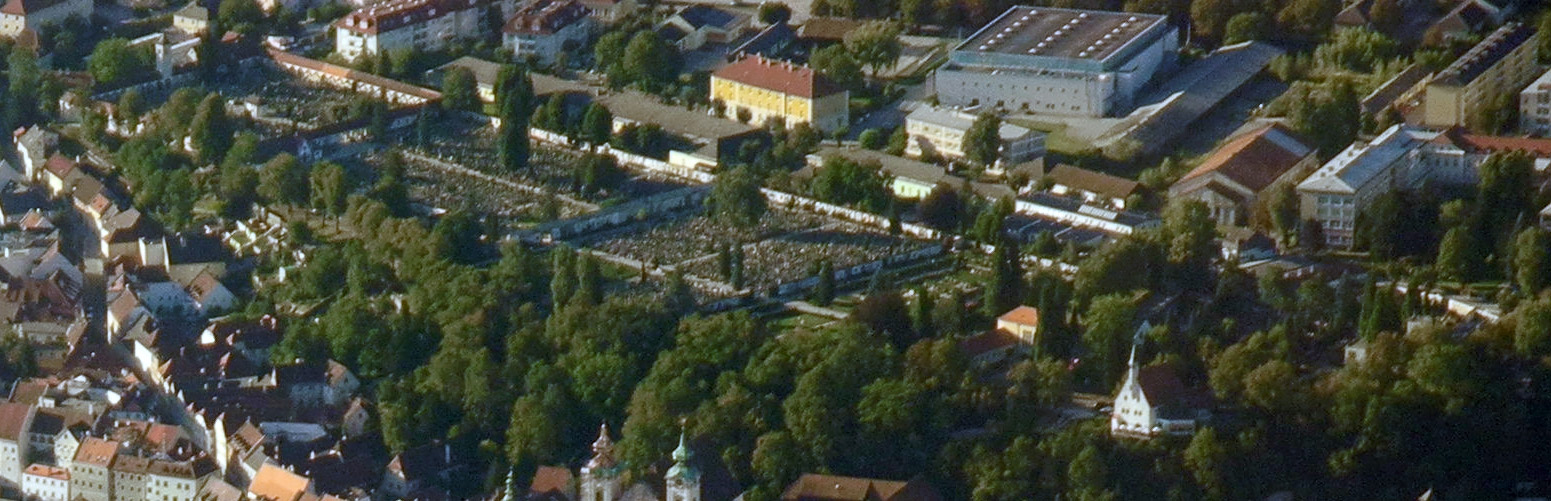 Luftaufnahme des Steyrer Taborfriedhofs und des Urnenfriedhofs am Tabor